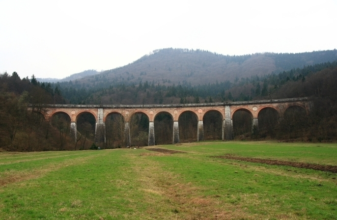 Jelenov viadukt za železnico Ljubljana-Trst v Borovnici